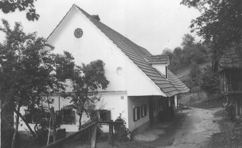 Rojstna hiša akademskega slikarja Simona Ogrina na Stari Vrhniki